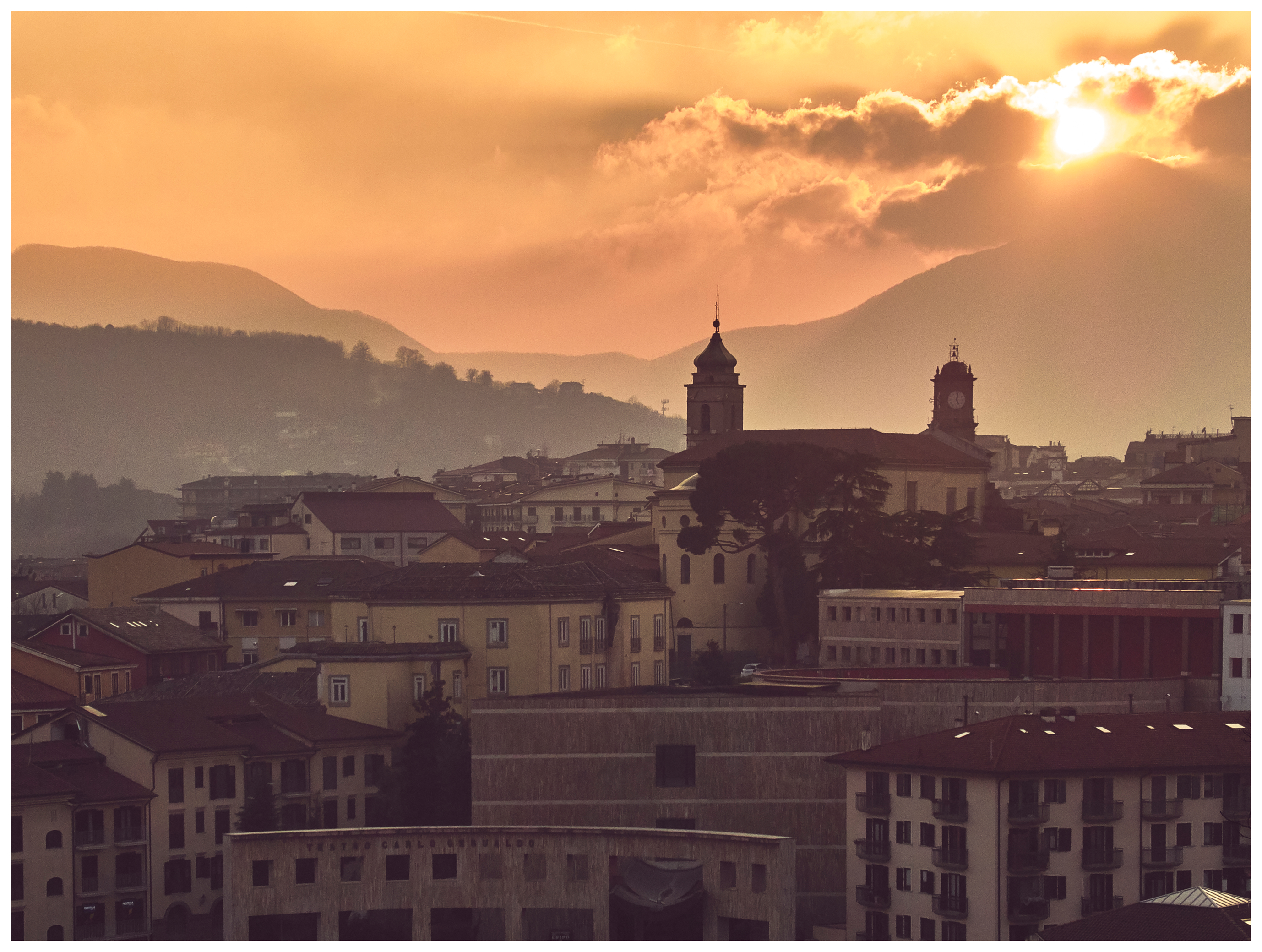 Teatro Gesualdo, Centro Storico, Duomo, Torre dell'Orologio al tramonto.